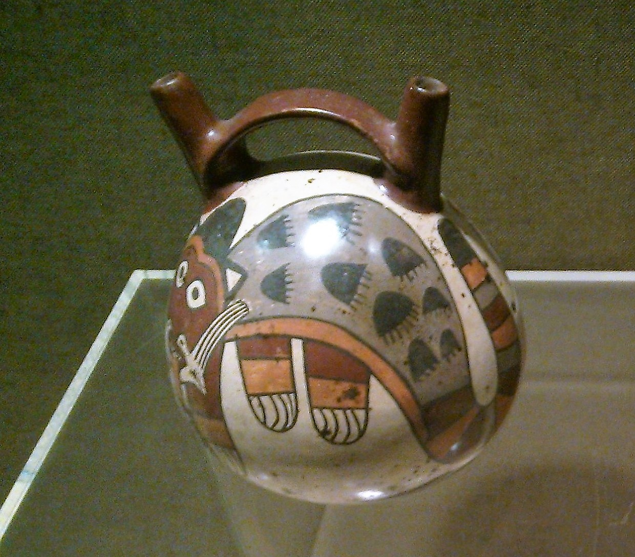 BIZEN中南米美術館の展示品。